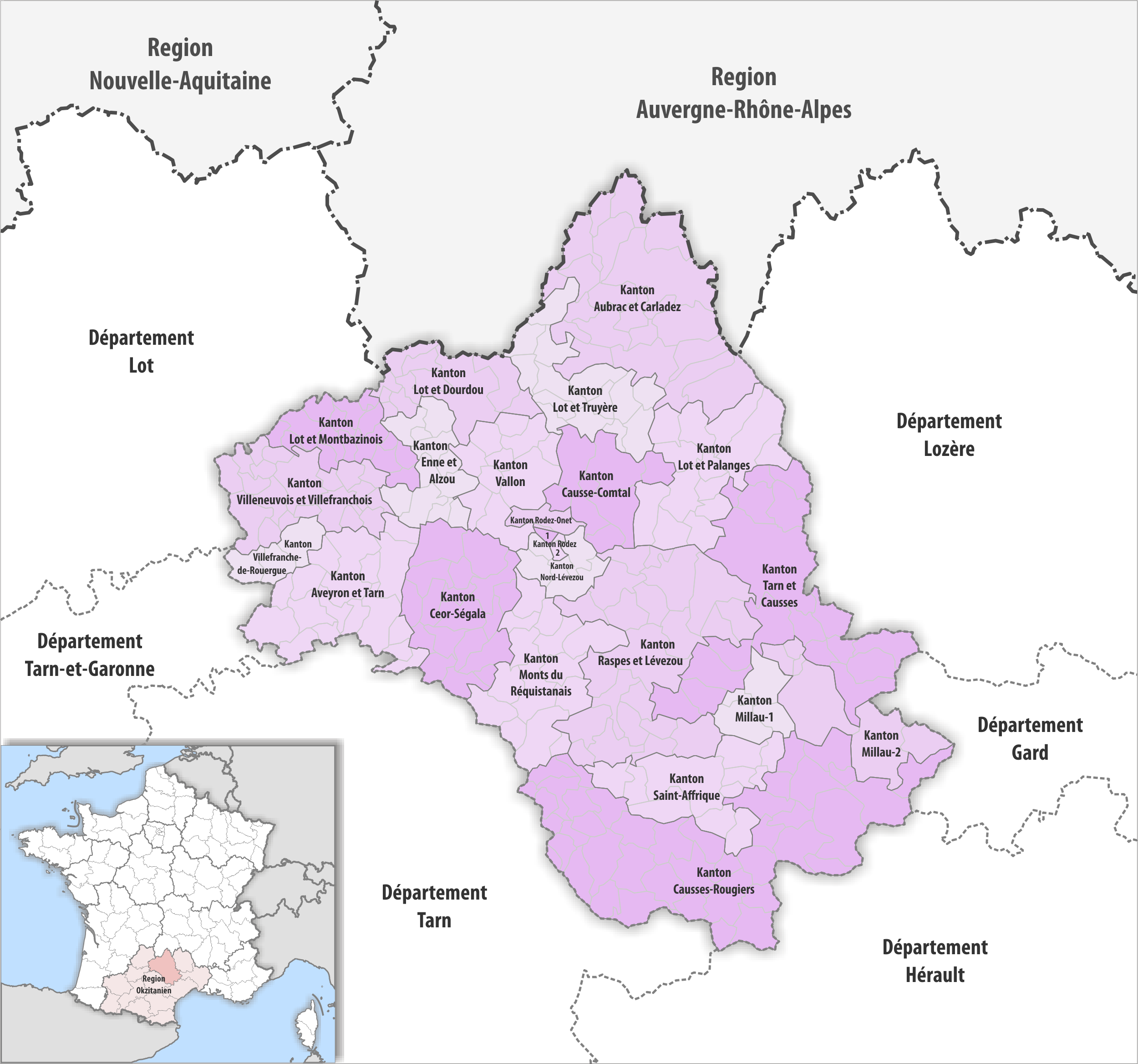 Gemeinden und Kantone im Departement Aveyron